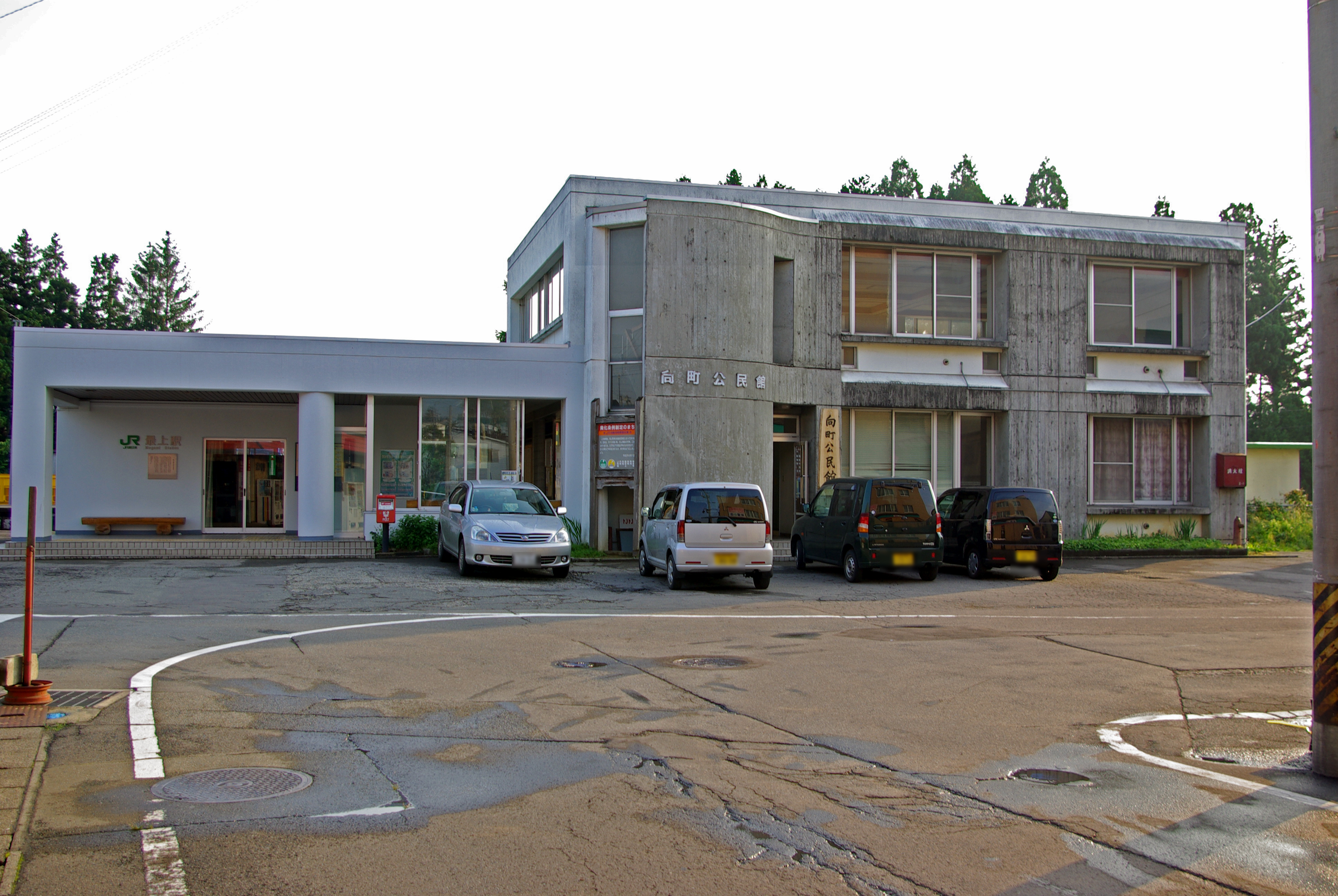 JR陸羽東線最上駅